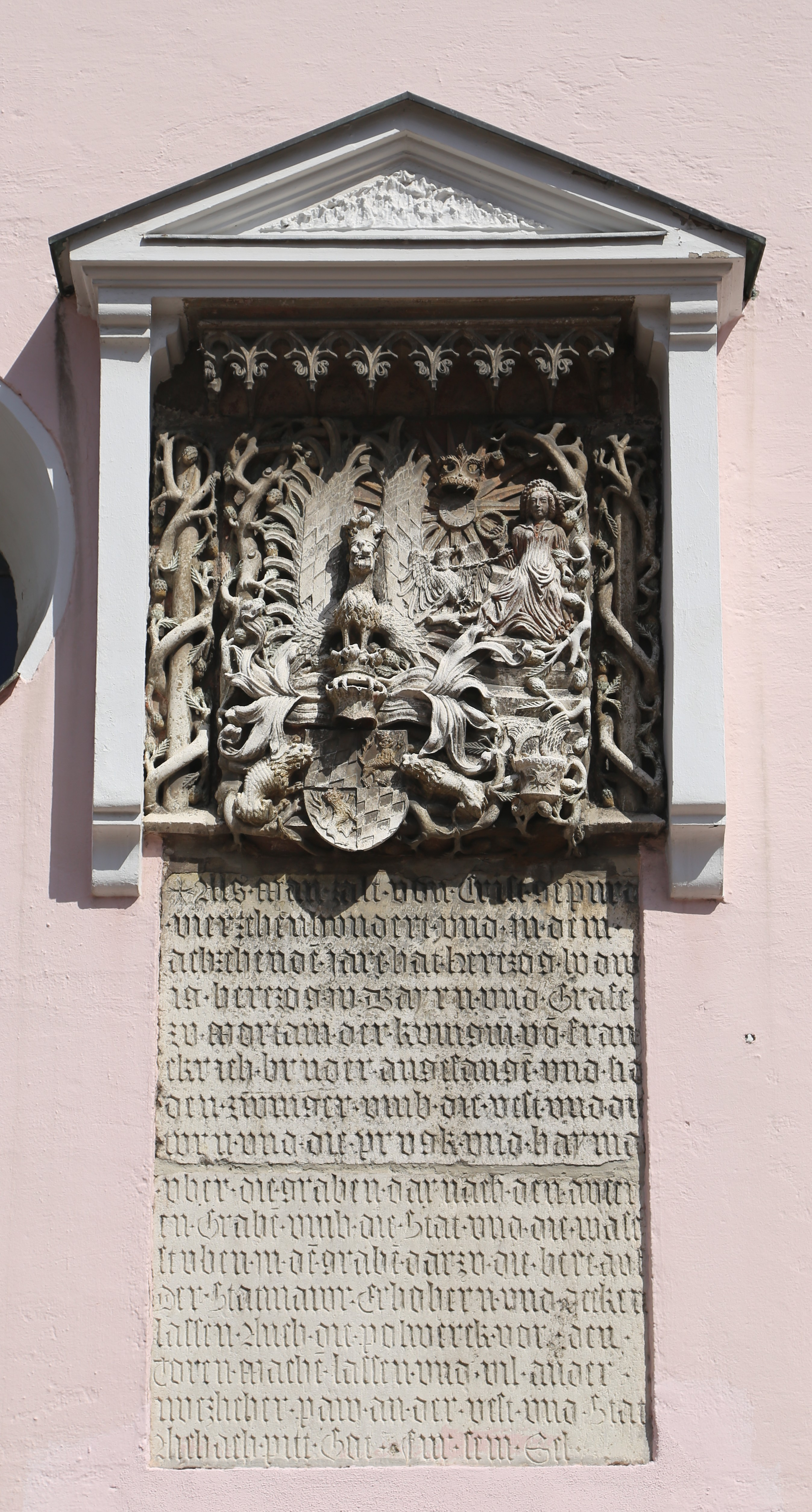 Stadtplatz 37, Aichach; Katholische Spitalkirche Heiliger Geist, zweischiffige Hallenkirche, Fassade mit Volutengiebel und reich gegliedertem Turm, im 15. Jahrhundert, 1642/43 wiederhergestellt, Turm 1734 und 1789; mit Ausstattung; Torbogen